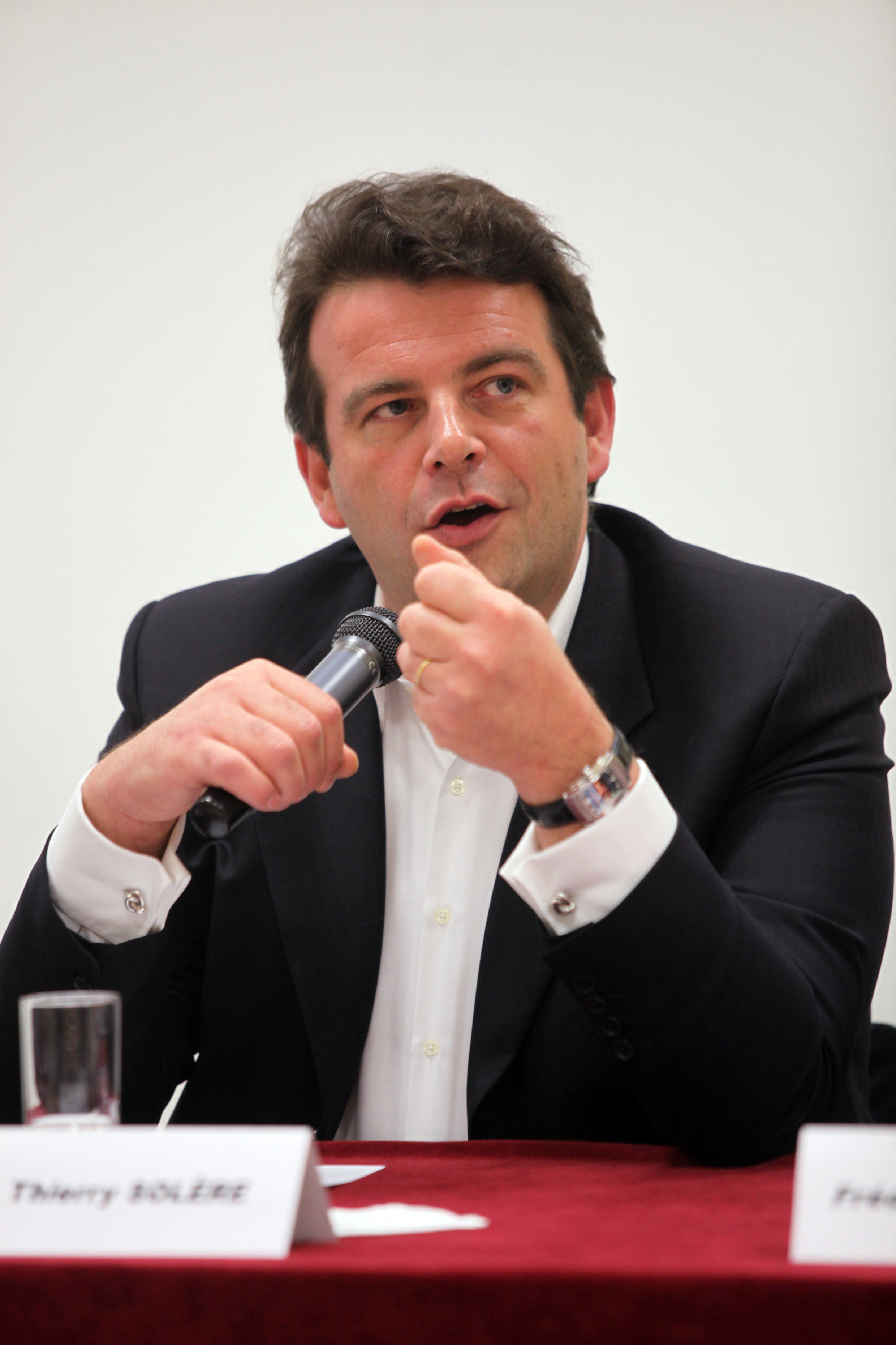 Le Web et l'opinion